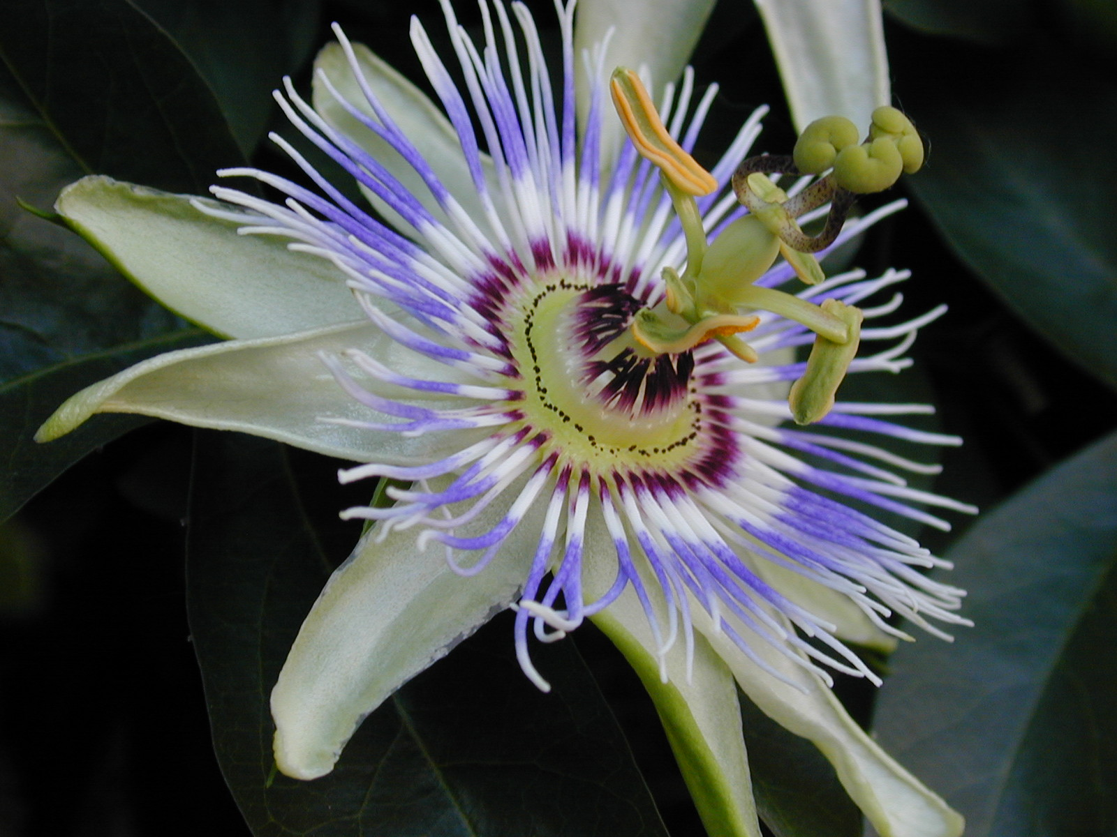 Passiflora caerulea